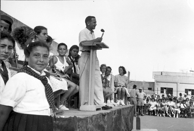 סיום שנהל עמנואל יפה מדבר; 1945 - ביהס הריאלי